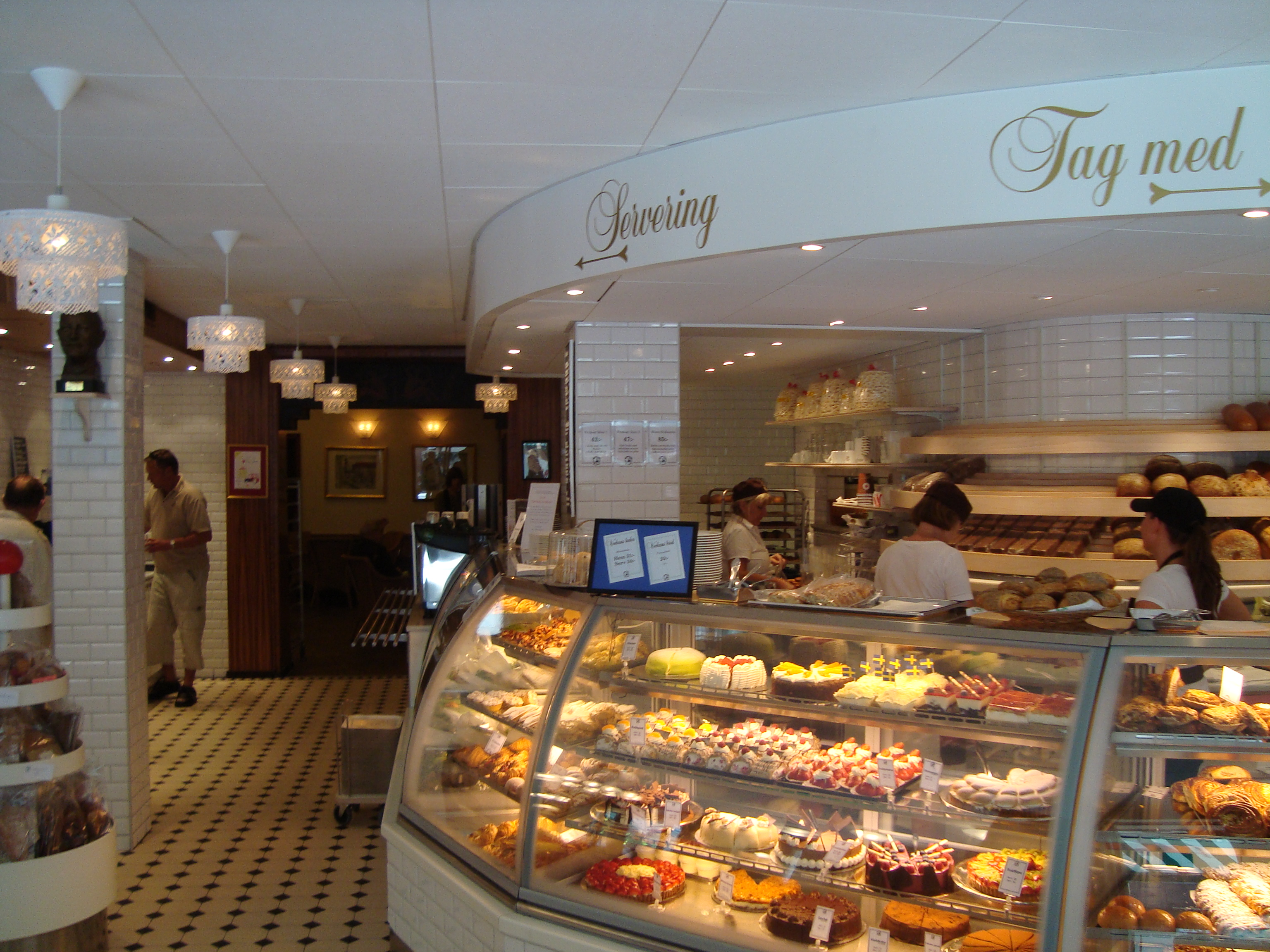 Fahlmans conditori i Helsingborg.